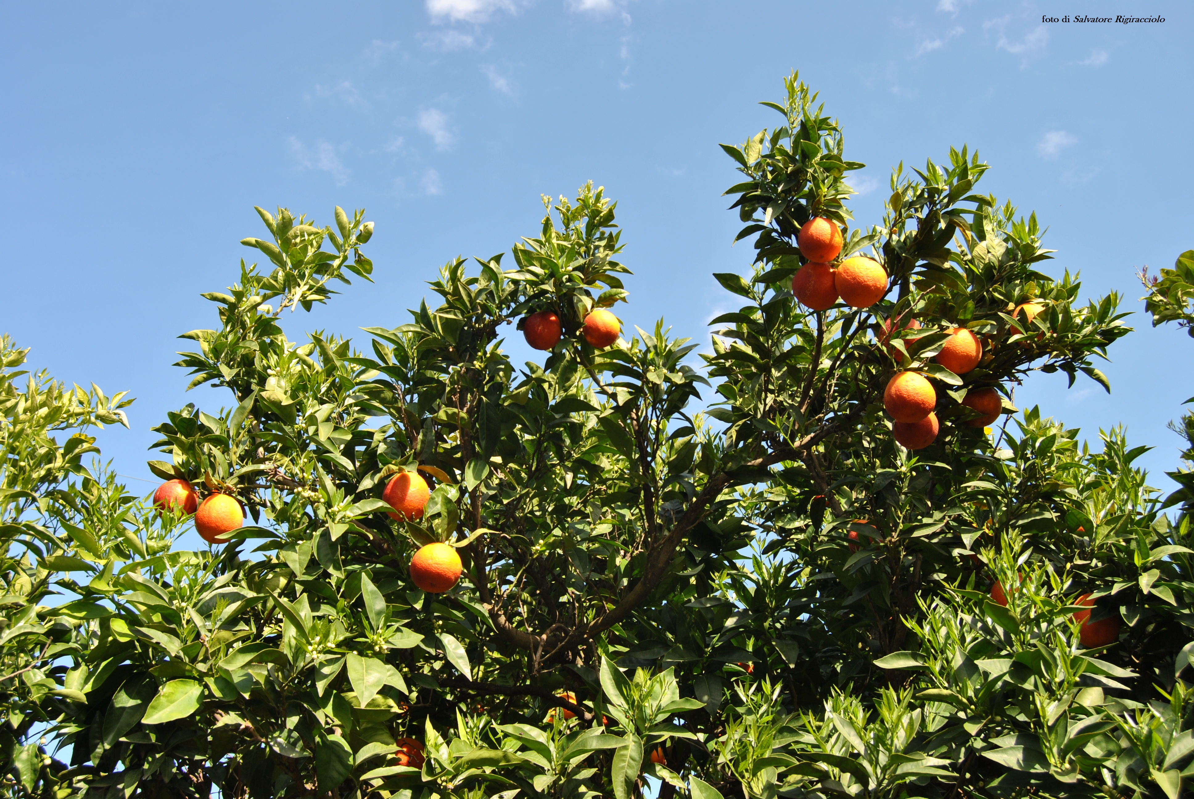 foto di Salvatore Rigiracciolo, scattata il 08/04/2012 a Galatrella.